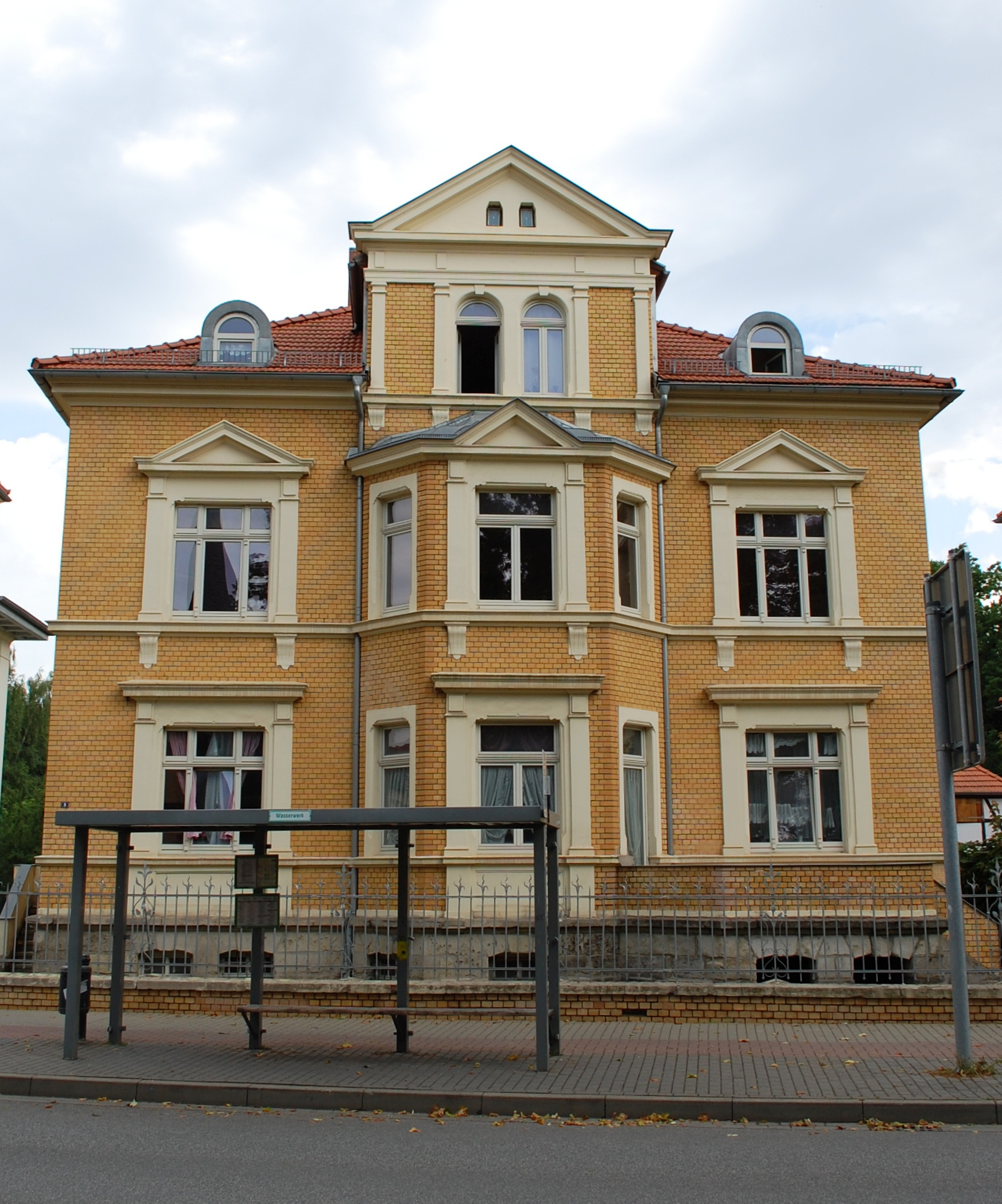 Haus Am Schiff Bleek 9 in Quedlinburg